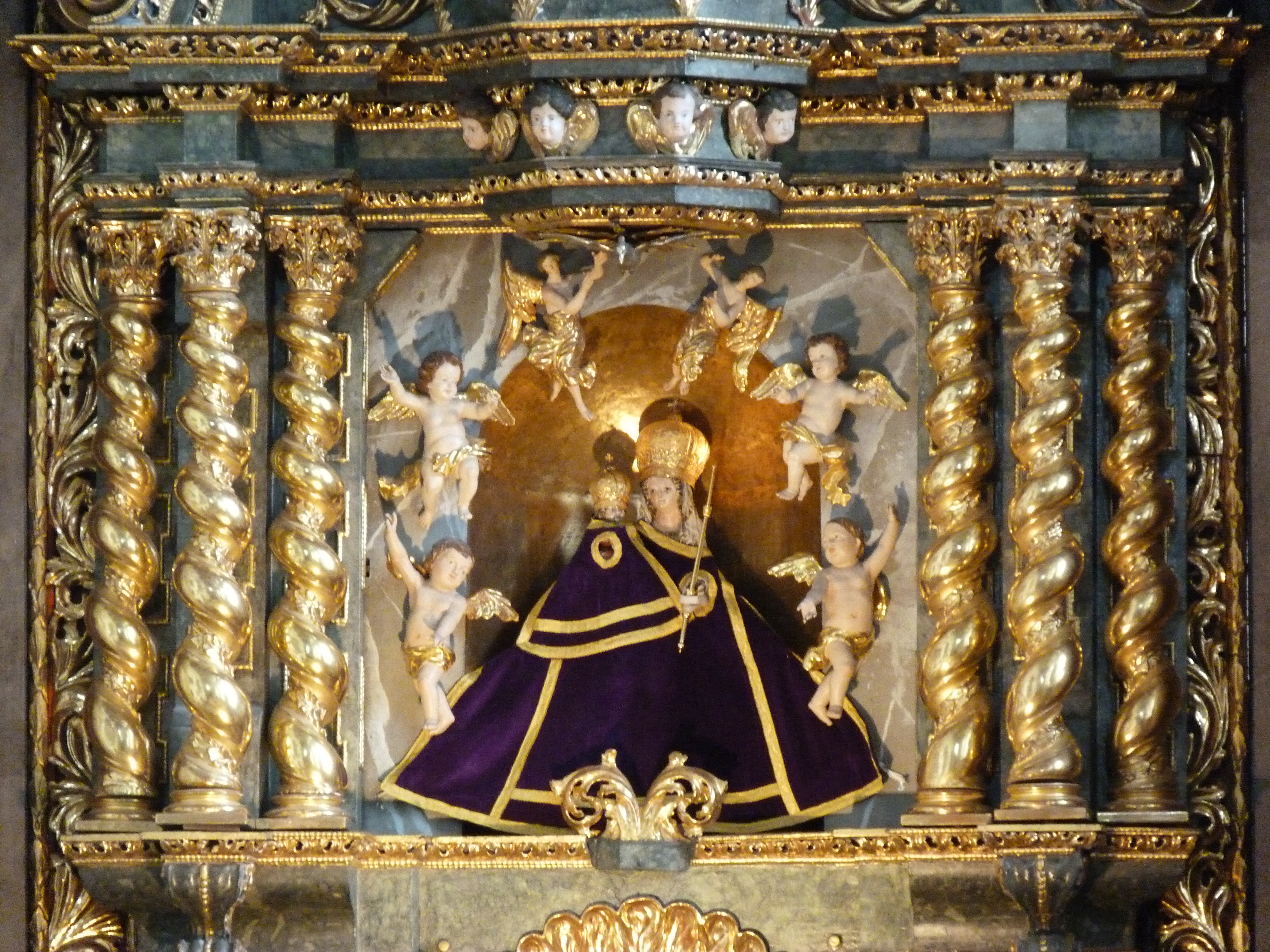 A felvétel 2014. december 4-én készült Boldogasszonyban. Kegytemplom, Nagyboldogasszony. A szobrot Eszterházy Pál hozatta Fraknóról. Fraknón a Nagyboldogasszony tiszteletére szentelt templomot 1347-ben avatták. Boldogasszonyban a hagyomány szerint II. András király uralkodása alatt a Fertő úgy kiöntött, hogy több falut elnyelt a víz. Ezek helyett alapítottak települést 1240-ben. 1324-ben "Zenmária" néven említik először. Területén már az ókorban település volt. Mosonszentandrás felé eső határrészén jelentős római településre utaló leletek kerültek elő. Mária kegyhelye már a 13. században ismert volt. Régi temploma a 14. században épült, ezt a török 1529-ben lerombolta. Mária-kegyképét 1661-ben hozták ide a Fraknói vár várkápolnájából, ahol az Eszterházyak tulajdonában volt. Az Eszterházy Pál által 1668-ban újjáépíttetett templomát és kolostorát 1683-ban a török ismét elpusztította. 1696 és 1702 között az olasz Francesco Martinelli tervei szerint bővítve építették újra fel. Régi híres búcsújáróhely. ©© Derzsi Elekes Andor, Budapest, 2014, Published in the Metapolisz DVD line. You are authorised to use this photo under Creative Commons – even for commercial, for profit purposes. The photo must be attributed to Derzsi Elekes Andor. All of the photos and vids in the Metapolisz DVD line are under Creative Commons and can be used even for commercial – for profit – purposes. Recommended Citation Derzsi Elekes Andor: Metapolisz DVD line